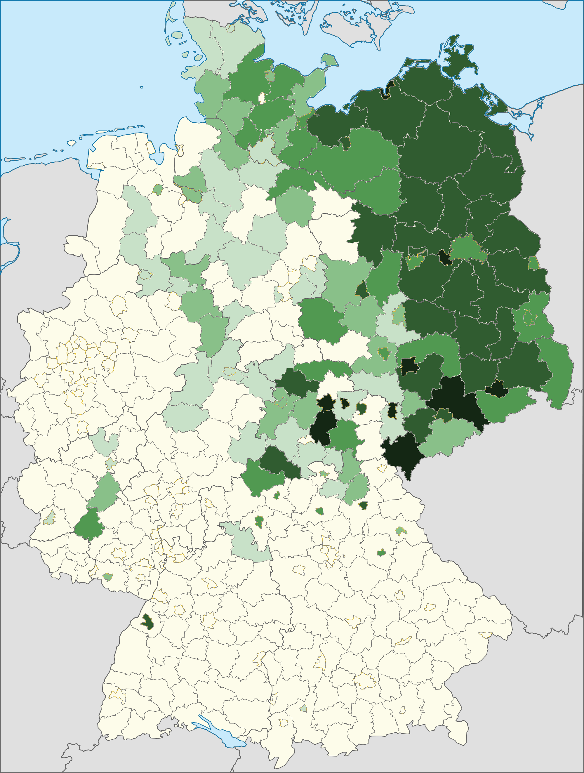 Karte der Personen mit russischer Staatsangehörigkeit und deren relativer Häufigkeit in den Landkreisen 2014. Dunkelgrün: häufigste ausländische Staatsangehörigkeit in diesem Kreis, hellgrün: fünfthäufigste ausländische Staatsangehörigkeit in diesem Kreis, weiß: sechsthäufig oder weniger. Quelle: Ausländerzentralregister, Stand 31. Dezember 2014. Saarland: keine Daten auf Kreisebene (dargestellt ist die Landesebene). Deutschlandweite relative Häufigkeit der ausländischen Staatsangehörigkeit Russische Föderation: Platz 7.